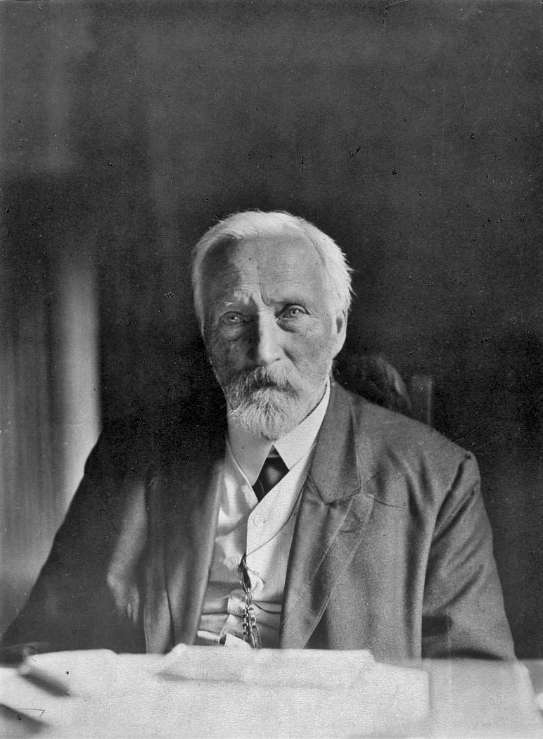 Беларуская (тарашкевіца): Бэнэдыкт Дыбоўскі